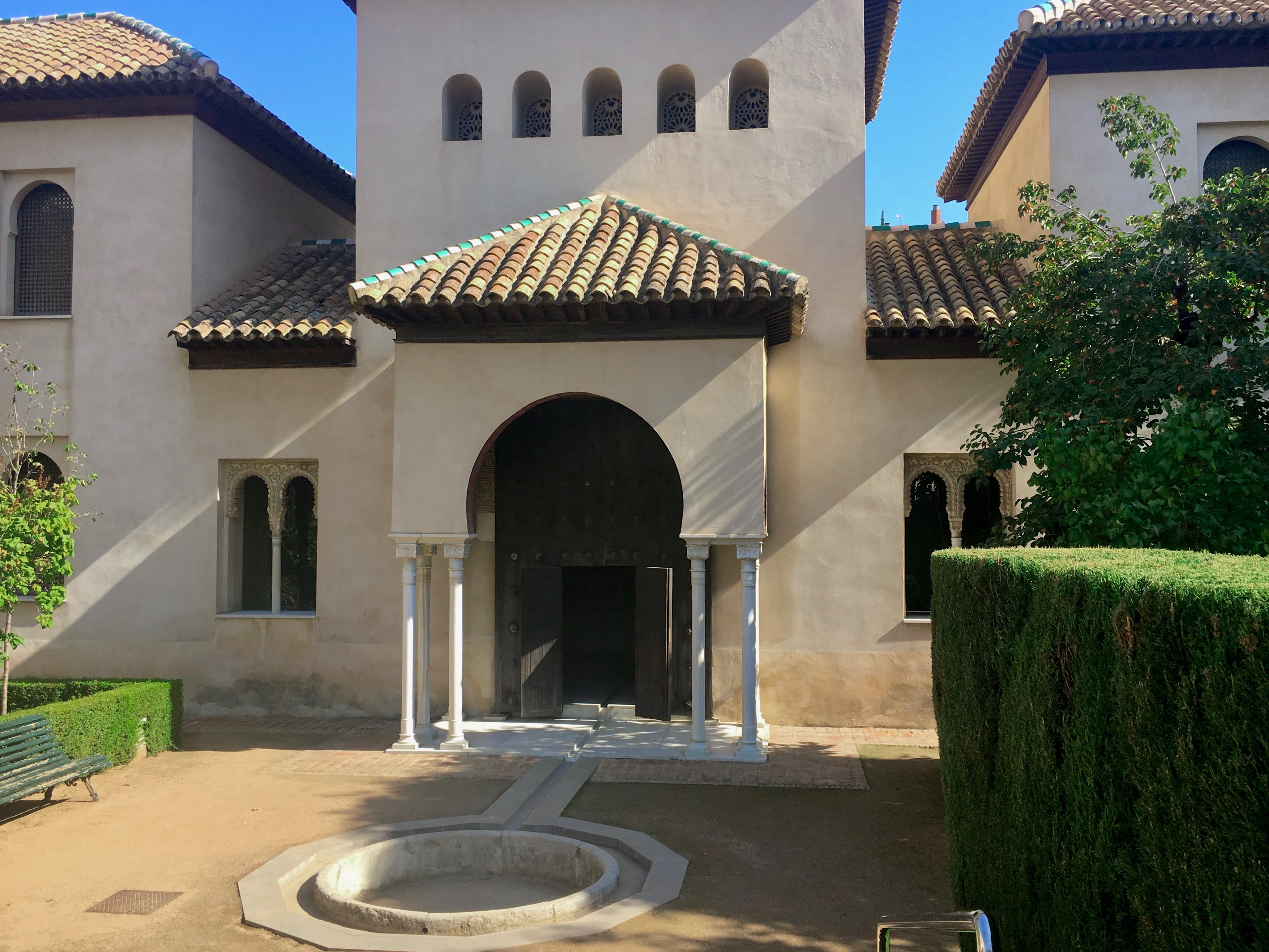 Palacio de Alcázar del Genil, en Granada.